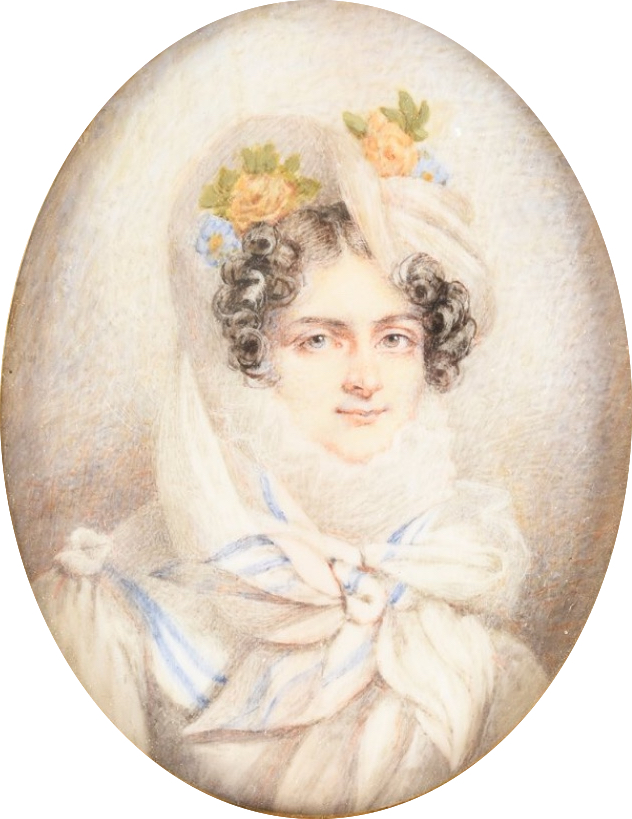 Stephanie Tascher de La Pagerie (1788-1832), duchesse d'Arenberg, puis marquise de Chaumont-Quitry